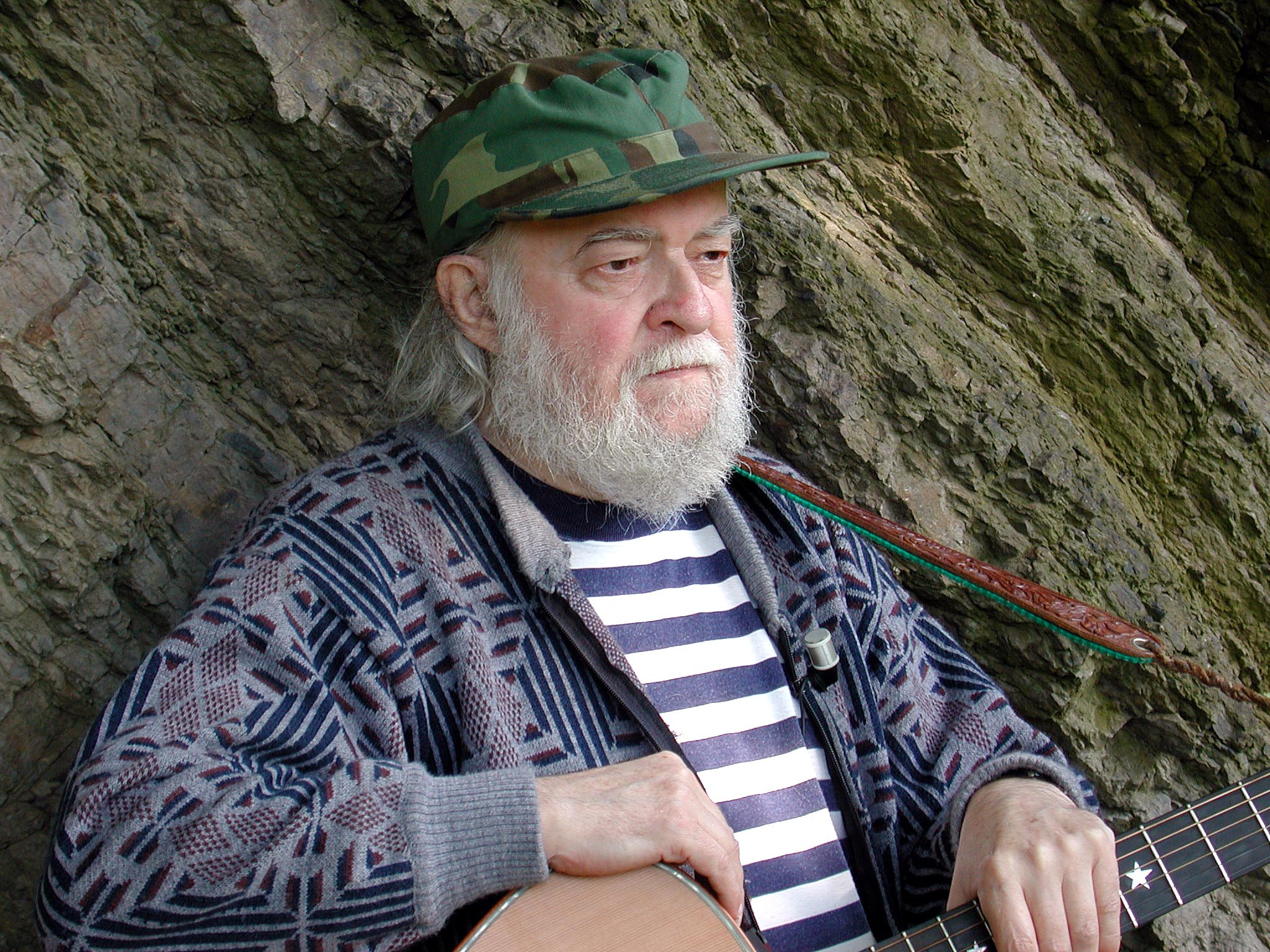 Foto z natáčení